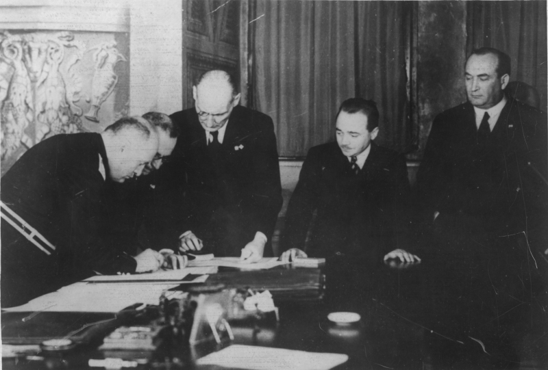 Dreierkonferenz in Rom von Dollfuß (Österreich), Gömbös (Ungarn) und Mussolini (Italien) bei der Unterzeichnung der "Römer Protokolle".